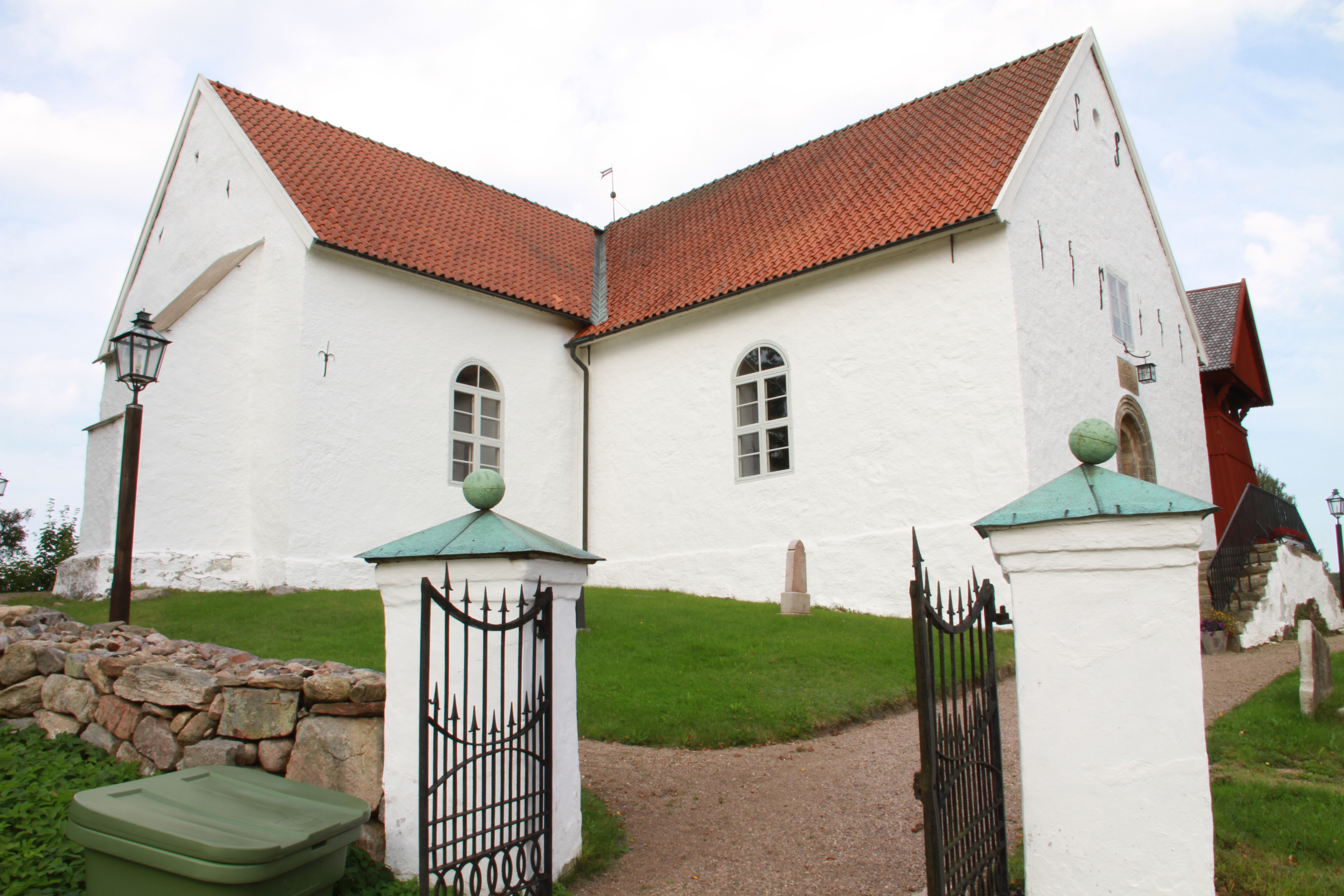 Foto taget vid ingången till kyrkan